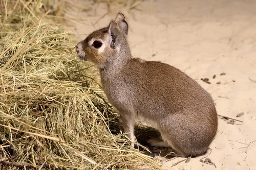 Чакоанская, или чакская, или малая мара (Dolichotis salinicola), Tierpark Berlin Friedrichsfelde